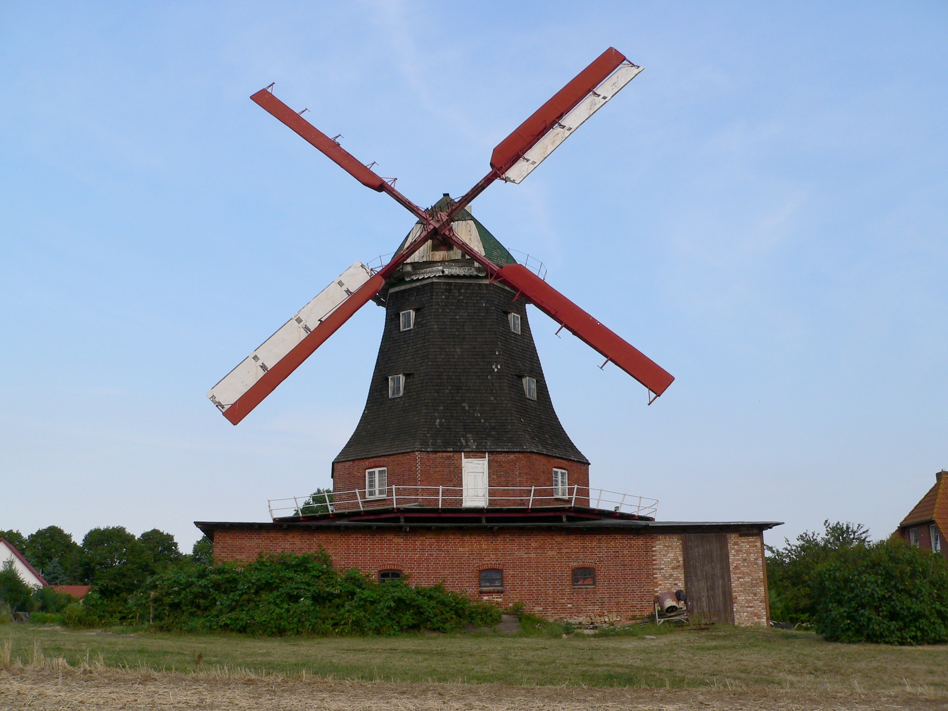 Galerie-Holländer-Windmühle in Neubukow